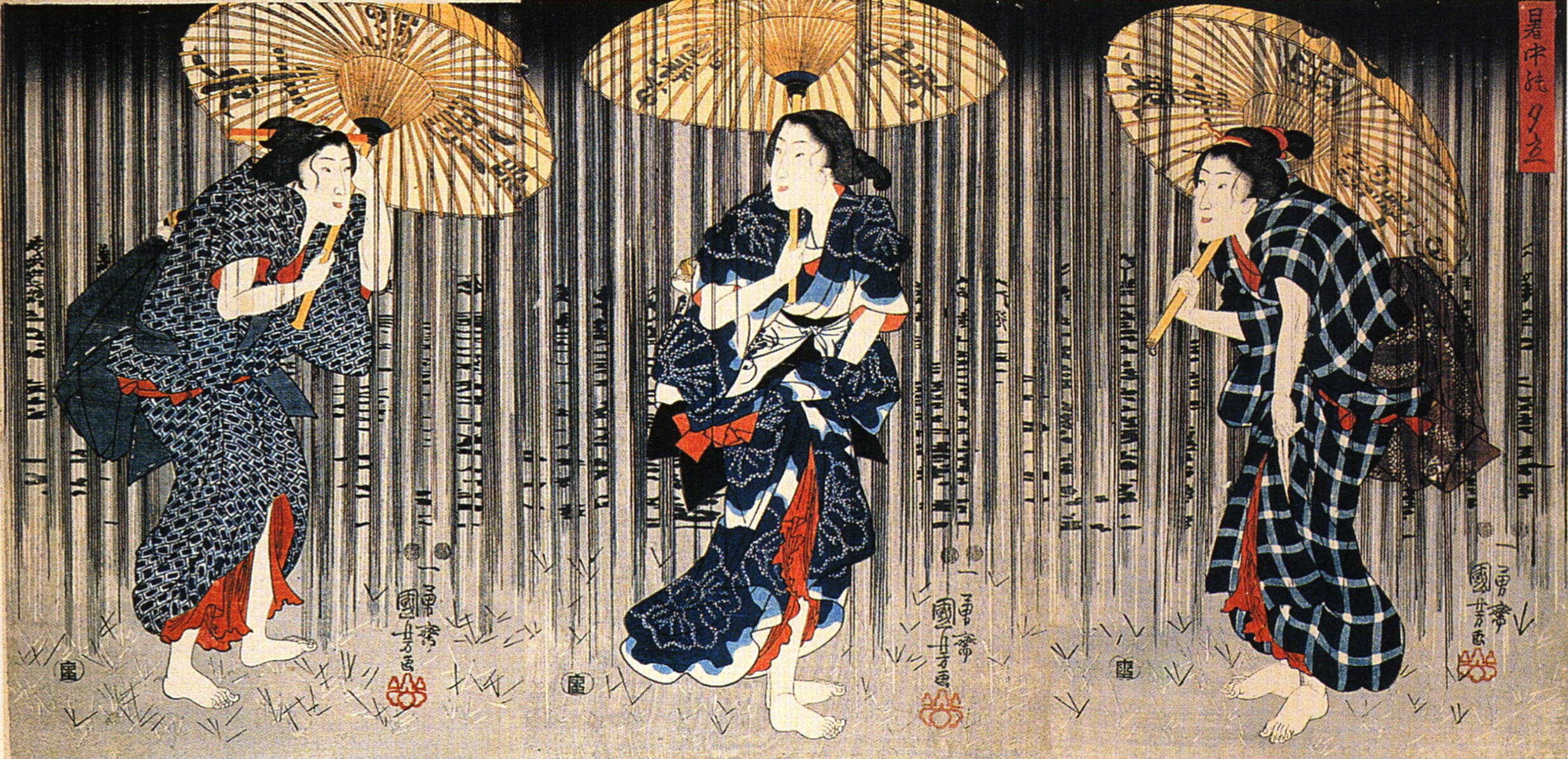 Women 13